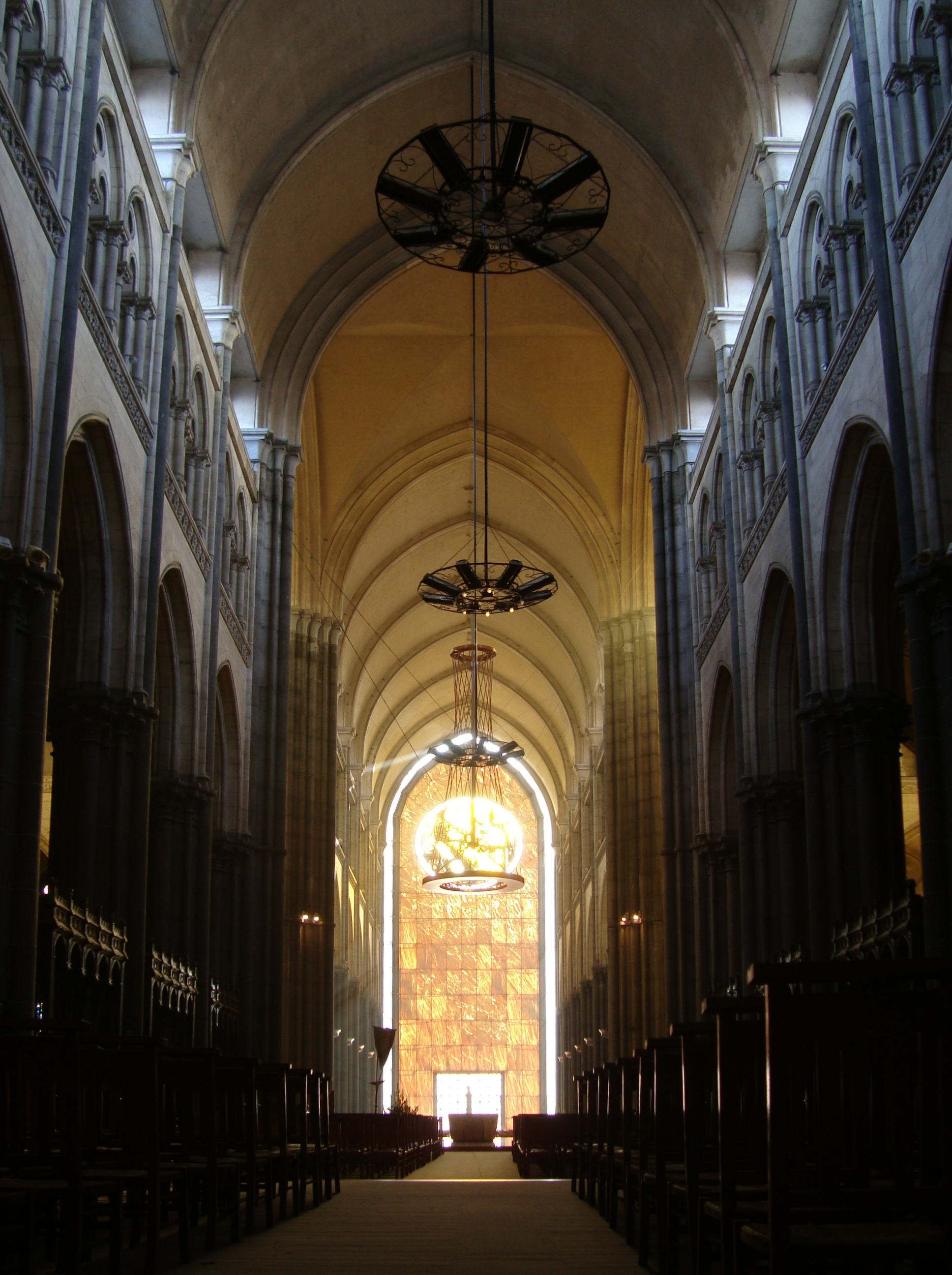 La nef de la cathédrale Notre-Dame-de-la-Treille de Lille (Nord).